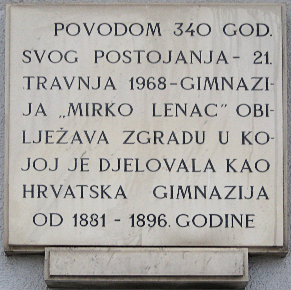 Spomen ploča na palači Adamić u Rijeci